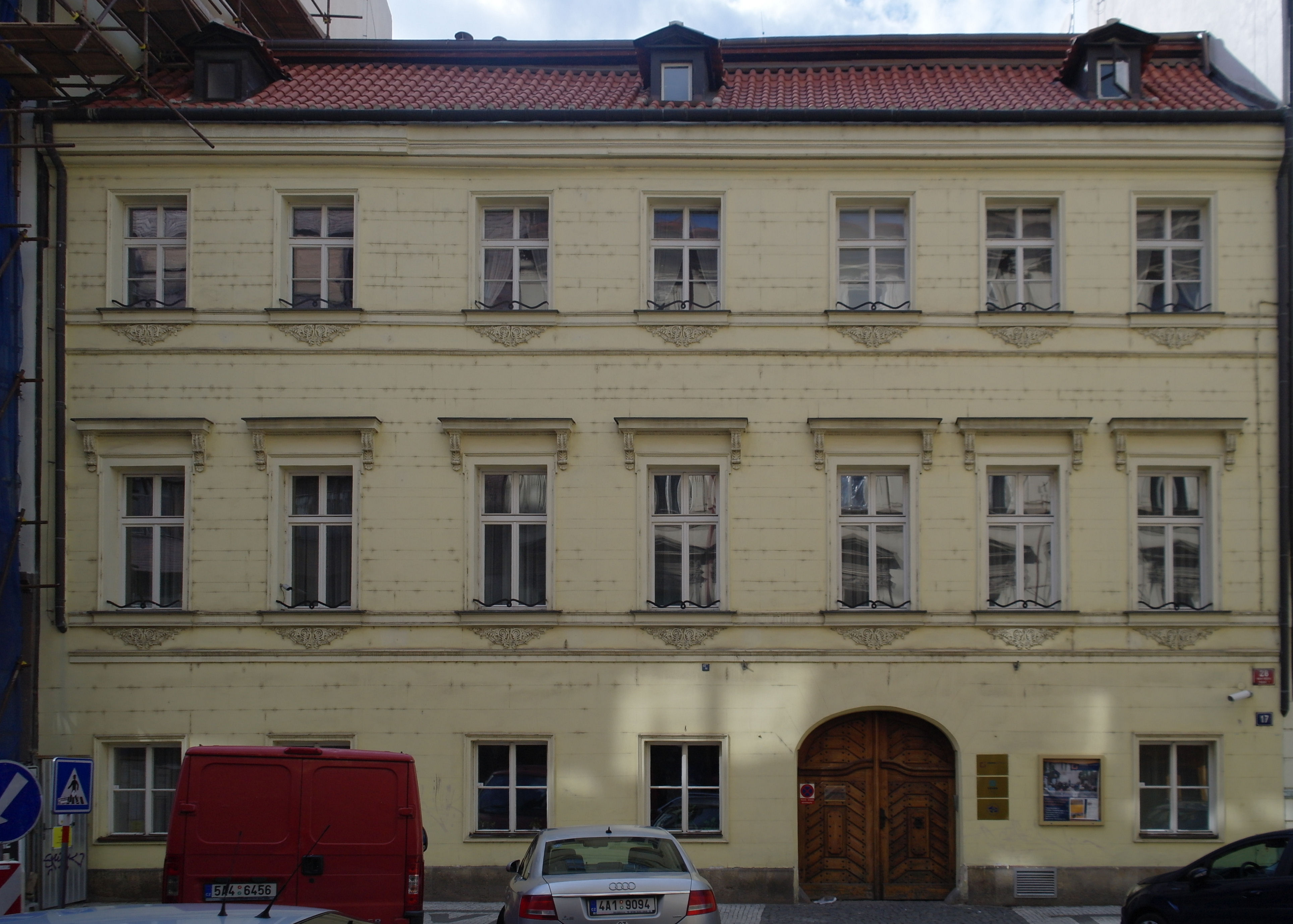 Měšťanský dům Měšťanská beseda, dům č.p. 28 v Praze na Novém Městě, Jungmannova 17. Dnes v budově sídlí CEVRO Institut, o.p.s.